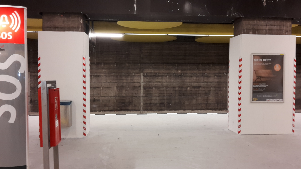 Linie U9 - Bahnsteig des Bahnhofs Rathaus Steglitz während des Bauzustandes am 14. September 2016